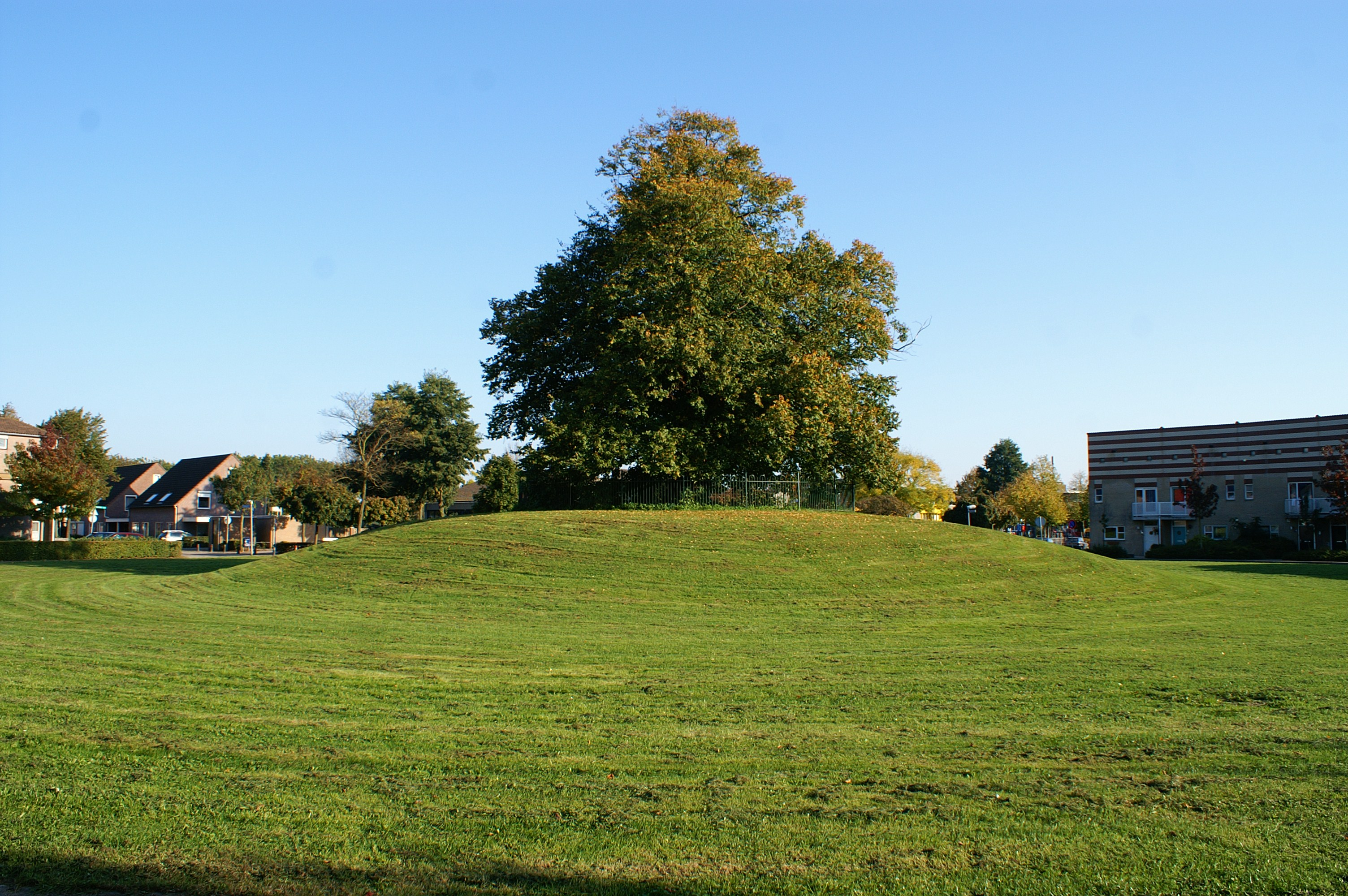 Terrein waarin de restanten van kasteel Rodenborch annex klooster Annenborch.